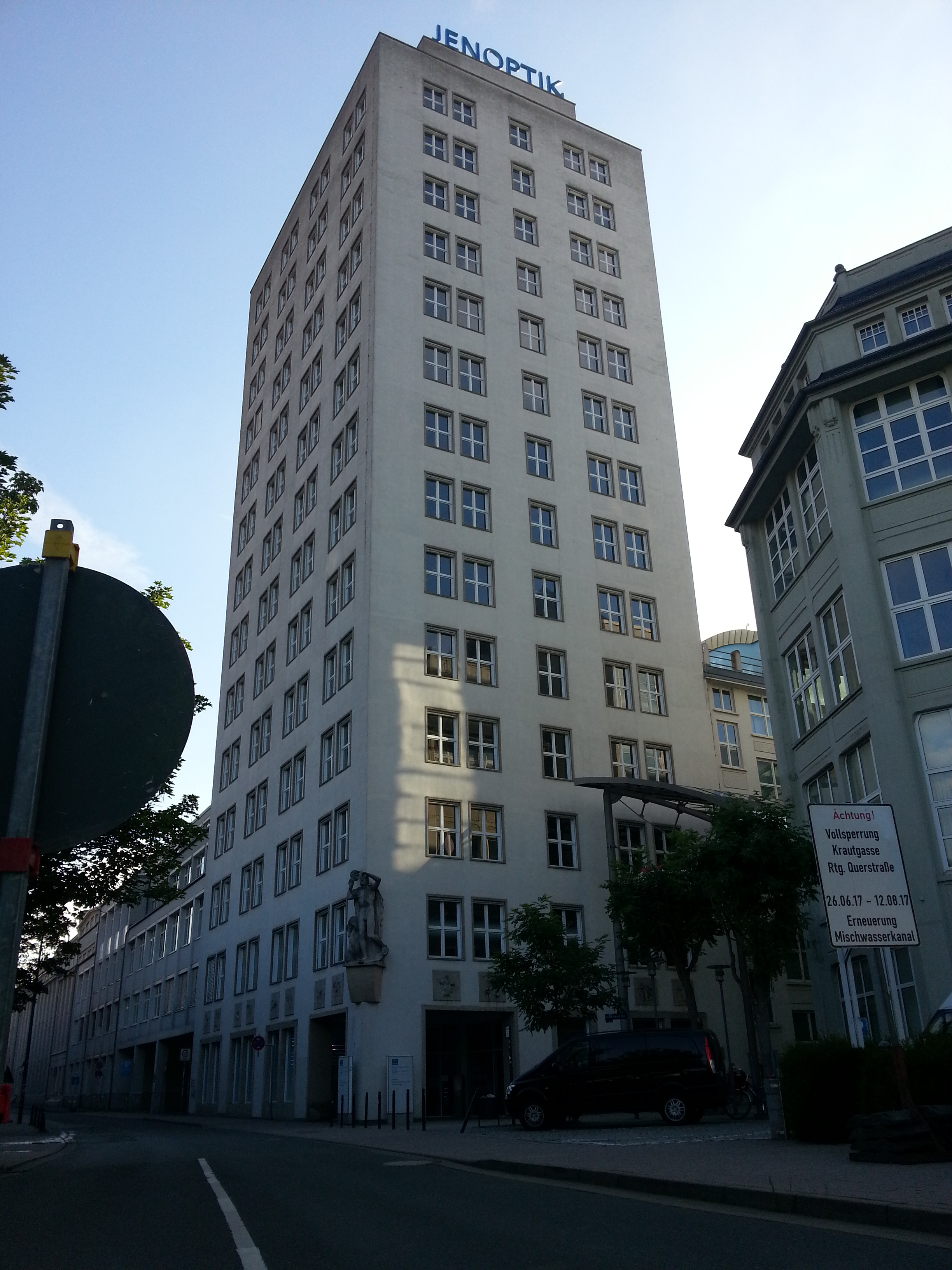 イェーナ市中心街にある本社（戦前のカール・ツァイス本社）